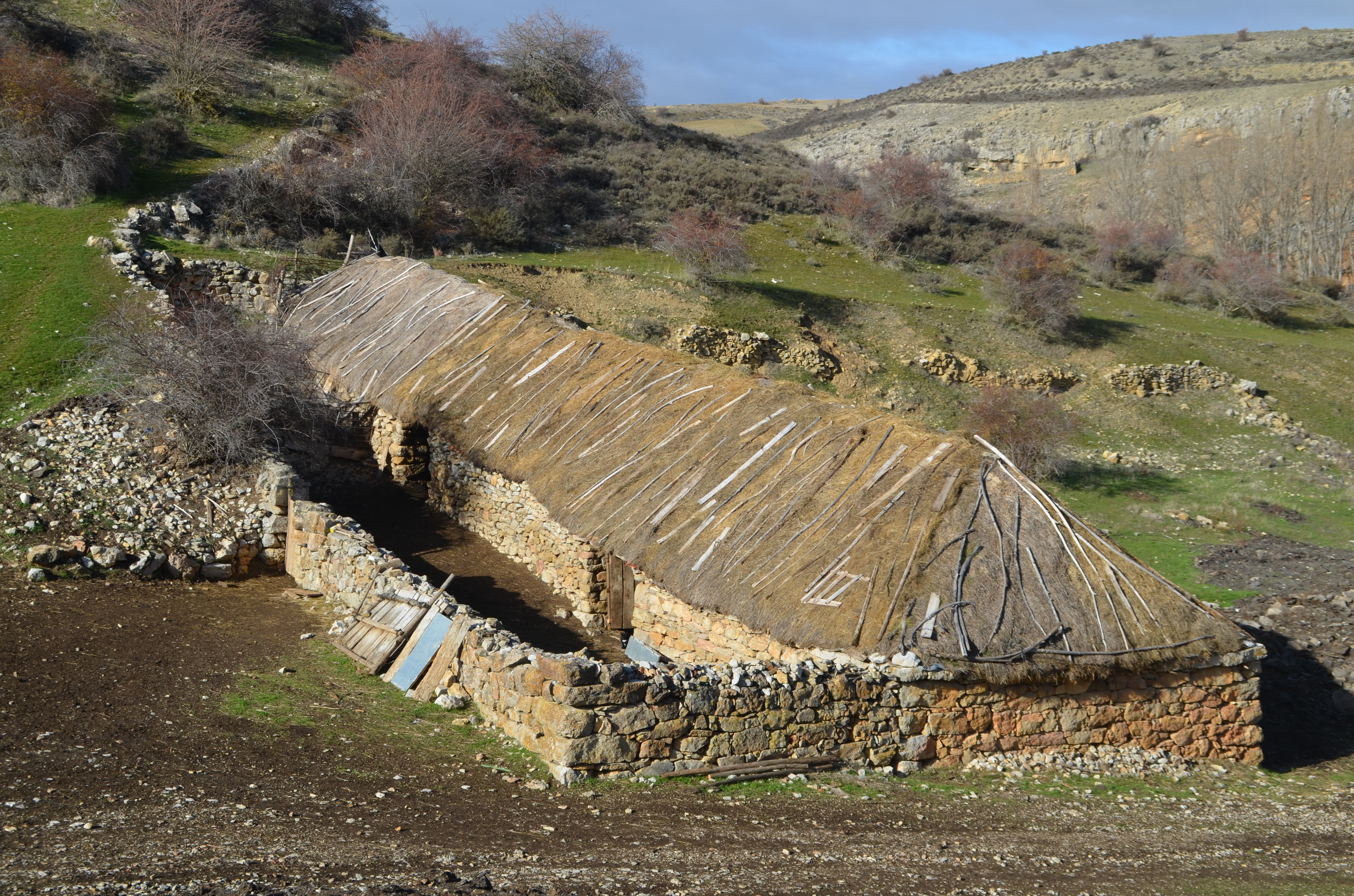 Las Tainas predominan en la Sierra Pela, entre las provincias de Soria y Guadalajara